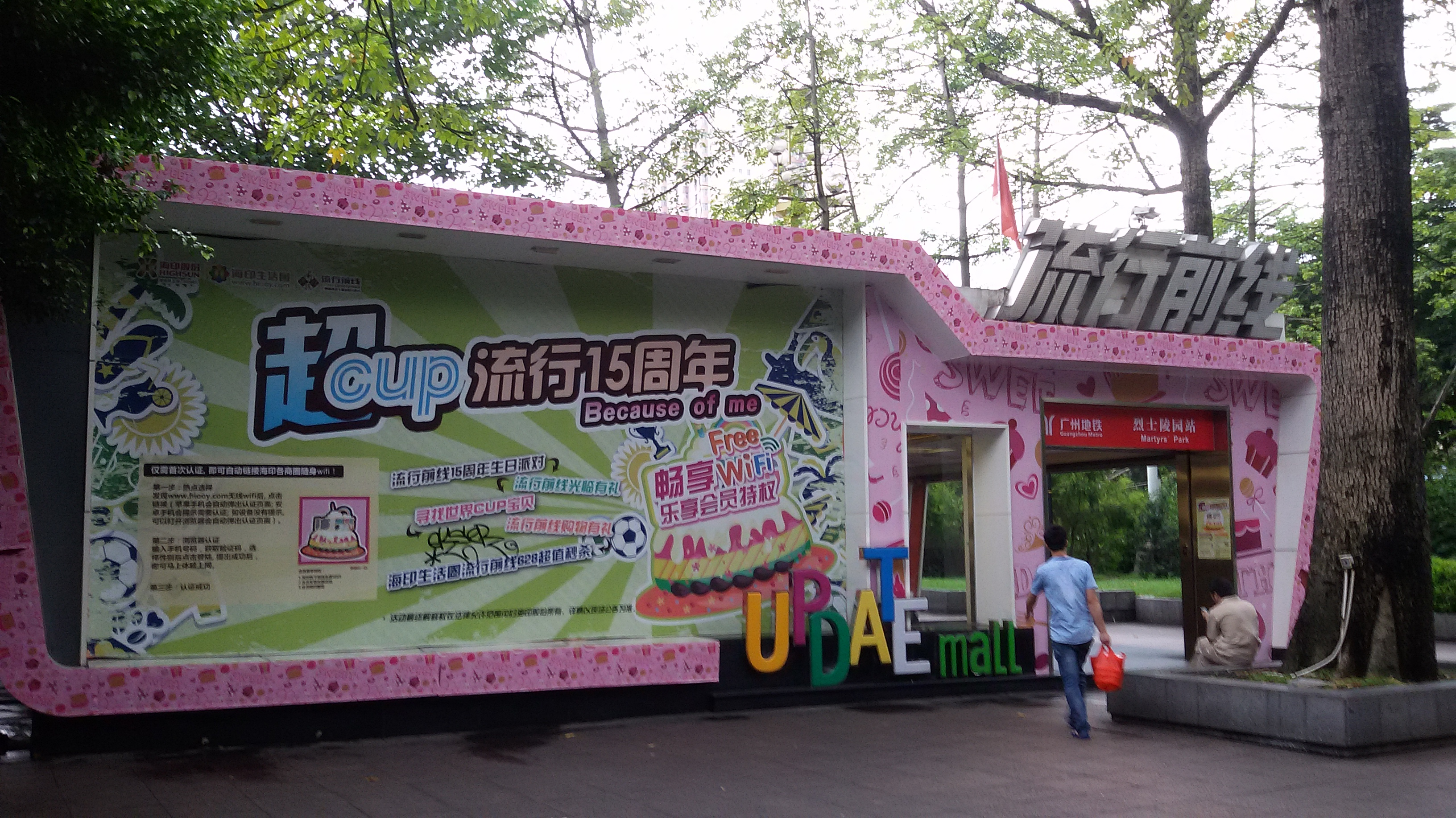 粵語: 流行前線